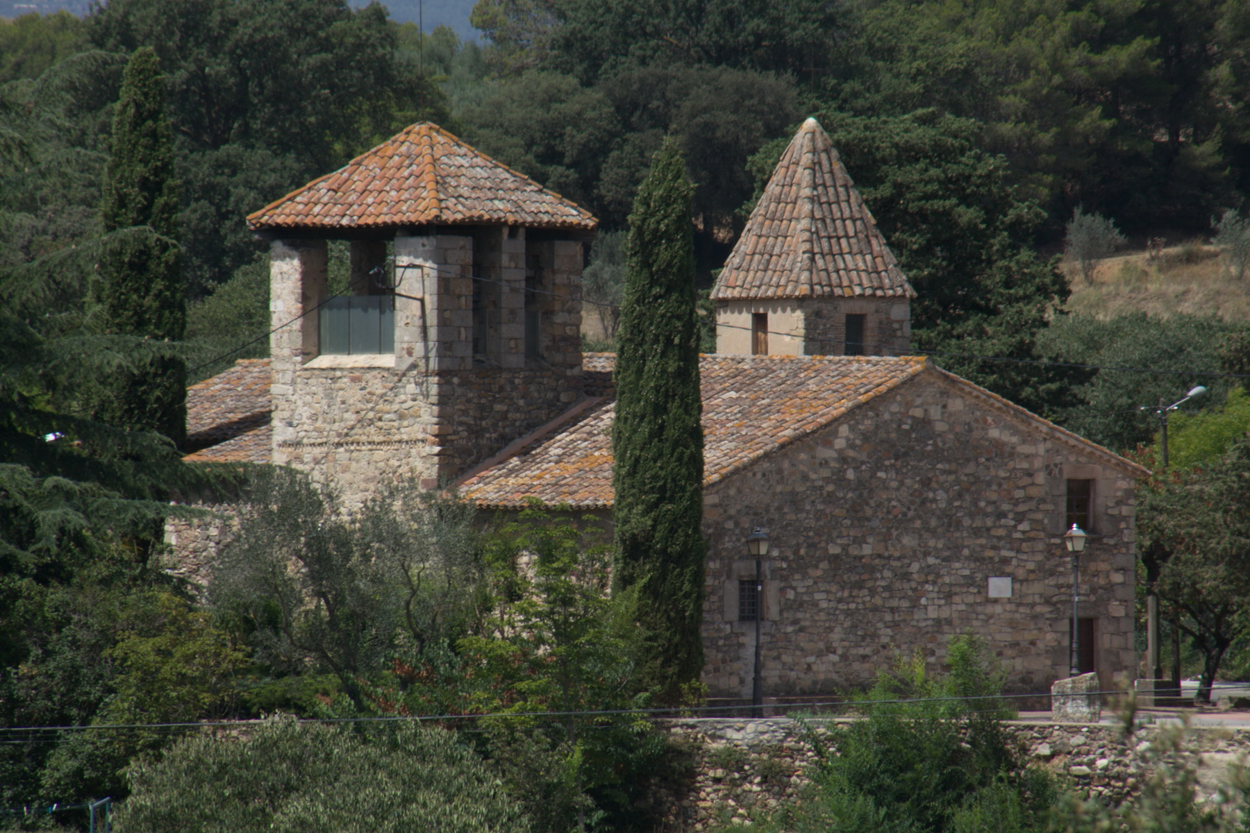 Església de Sant Mamet de Corró d'Amunt (les Franqueses del Vallès)